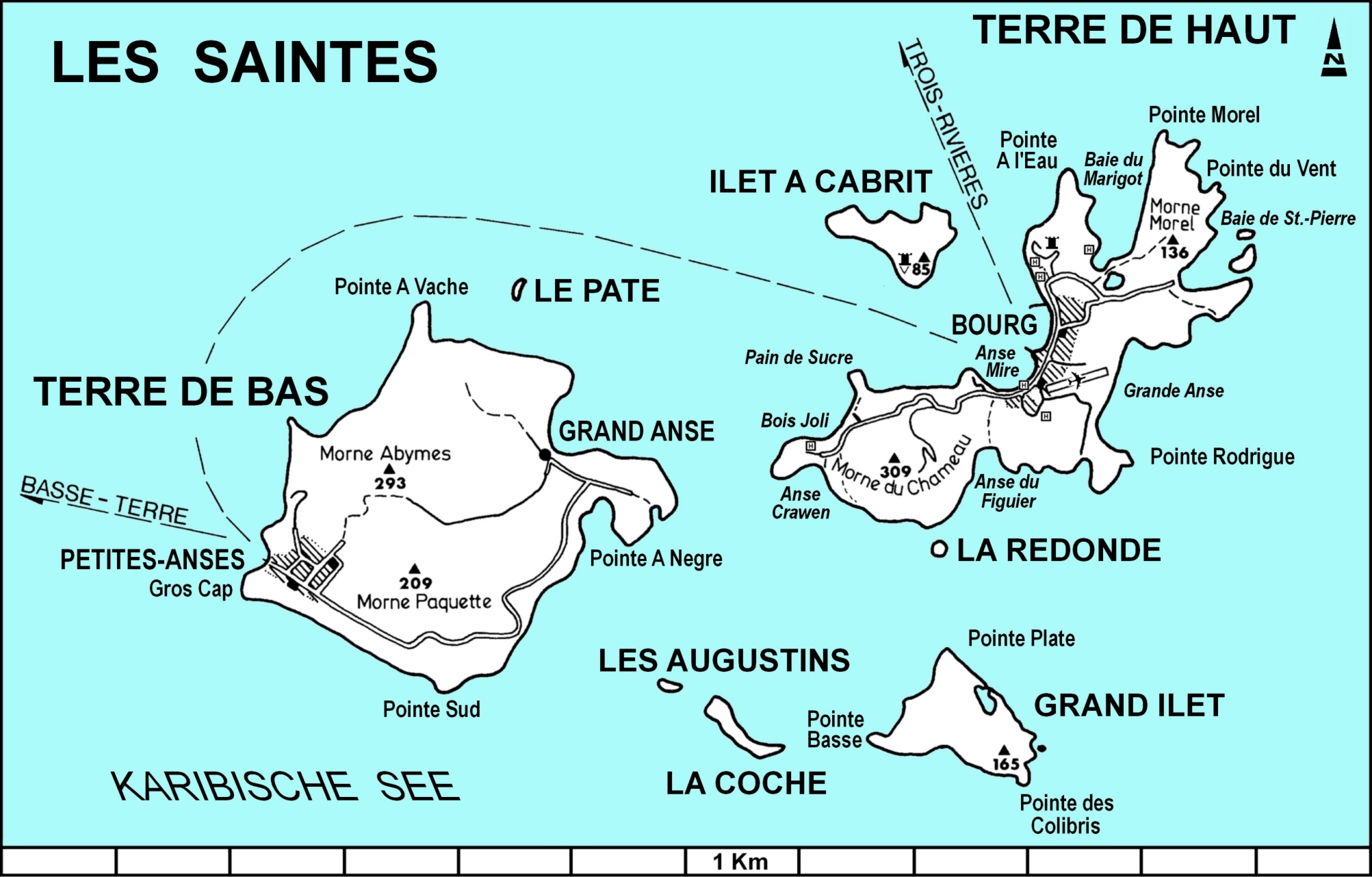 Karte der Inselgruppe Les Saintes